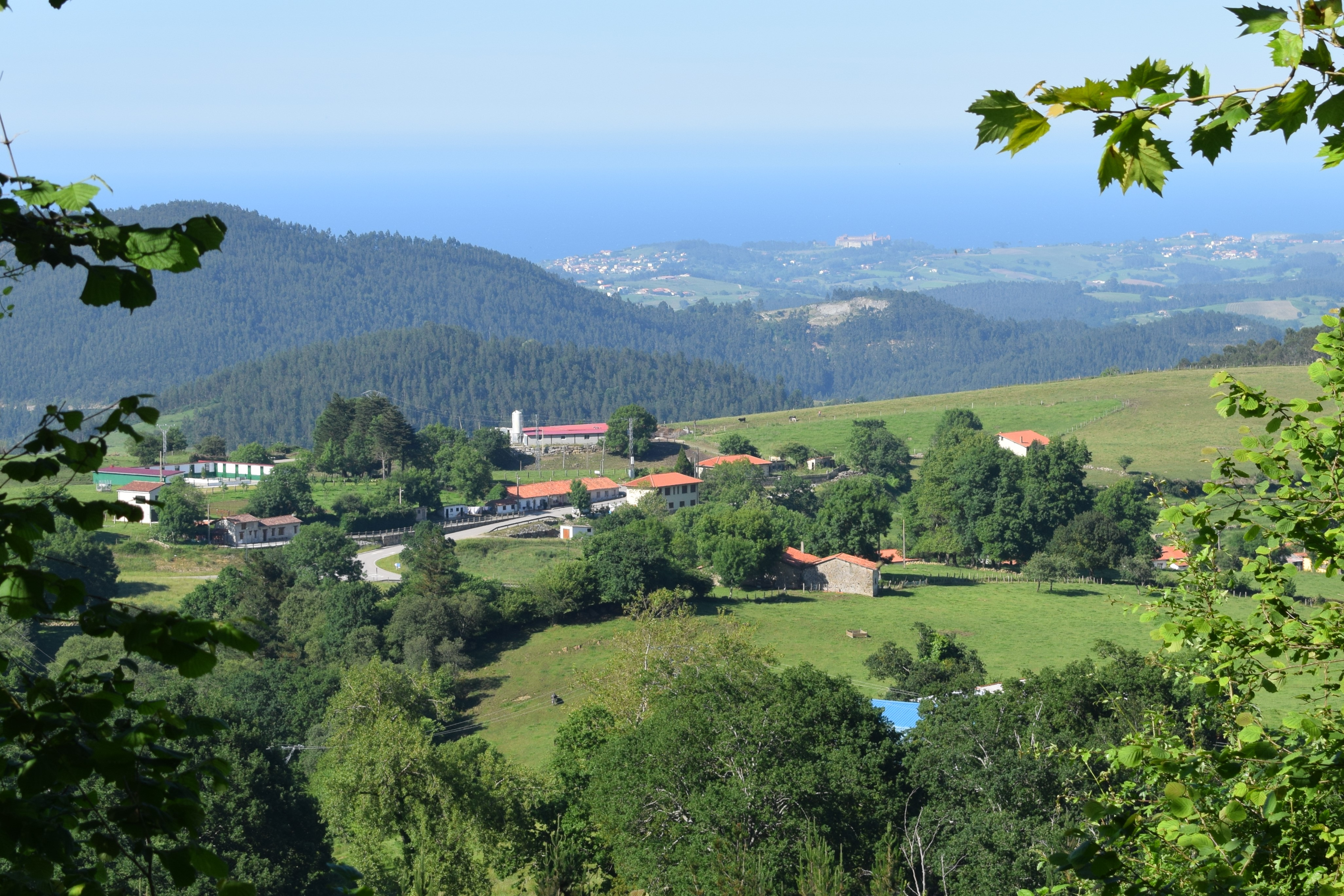 Vista del barrio de Caviña o La Florida del municipio de Valdáliga (Cantabria, España), con orígenes mineros. Imagen tomada desde la subida a Plaza del Monte, en la sierra de Arnero.